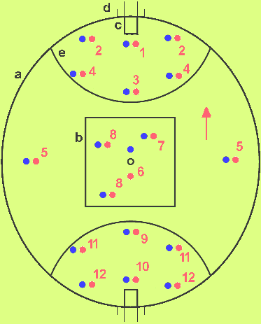 terrain de foot australien et position de base des joueurs. Modification par Ssire et adaptation du dessin de Robert Merkel sur Wiki Anglais, image mise dans le domaine public.